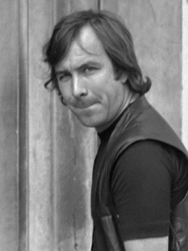 Kort Geding i.v.m. weigering van Ajax om journalist Maarten de Vos mee te laten vliegen naar Argentinie, Maarten de Vos 28 augustus 1972